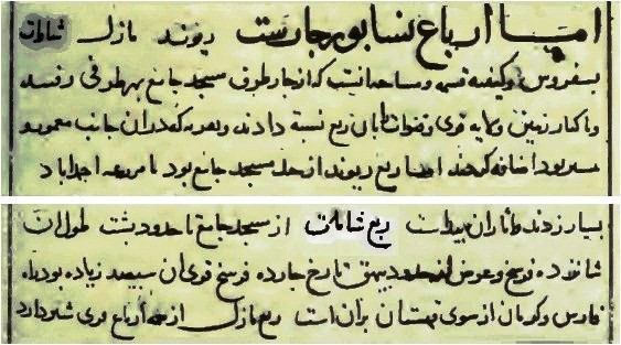 بریده‌ای از صفحه مروبط به ارباع نیشابو و ربع شامات از نسخه خطی کتاب تاریخی نیشابور الحاکم که در قرون چهارم هجری می زیسته است